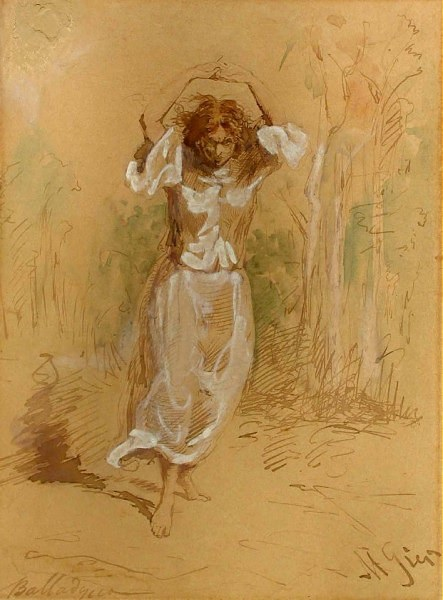 Balladyna (ilustracja do „Balladyny” Juliusza Słowackiego)